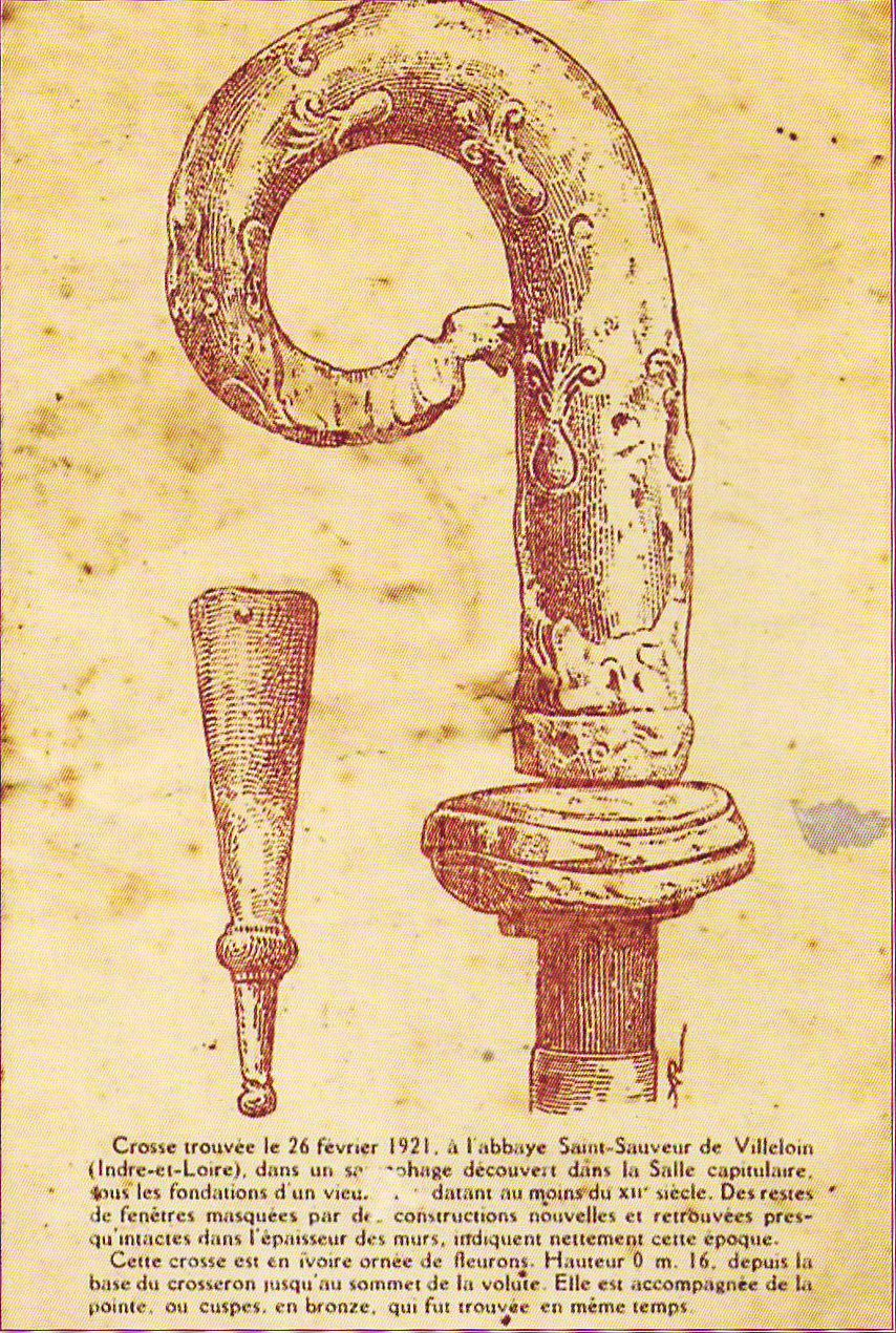 Crosse épiscopale du XIIIème siècle en ivoire de 16 cm est ornée de fleurons. Elle a été trouvée le le 26 février 1921 par Monsieur Charles Paillaud dans la salle capitulaire de l'Abbaye de Villeloin à Villeloin-Coulangé. Elle est accompagnée de la pointe, ou cuspes, en bronze, qui fut trouvée en même temps. Visible au Musée de Cluny à Paris (Musée National du Moyen âge).